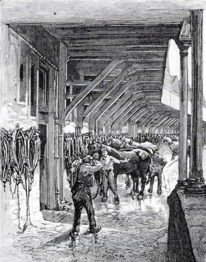 Cour couverte d'un dépot de la Compagnie générale des omnibus (CGO) dédiée au harnachement des chevaux.